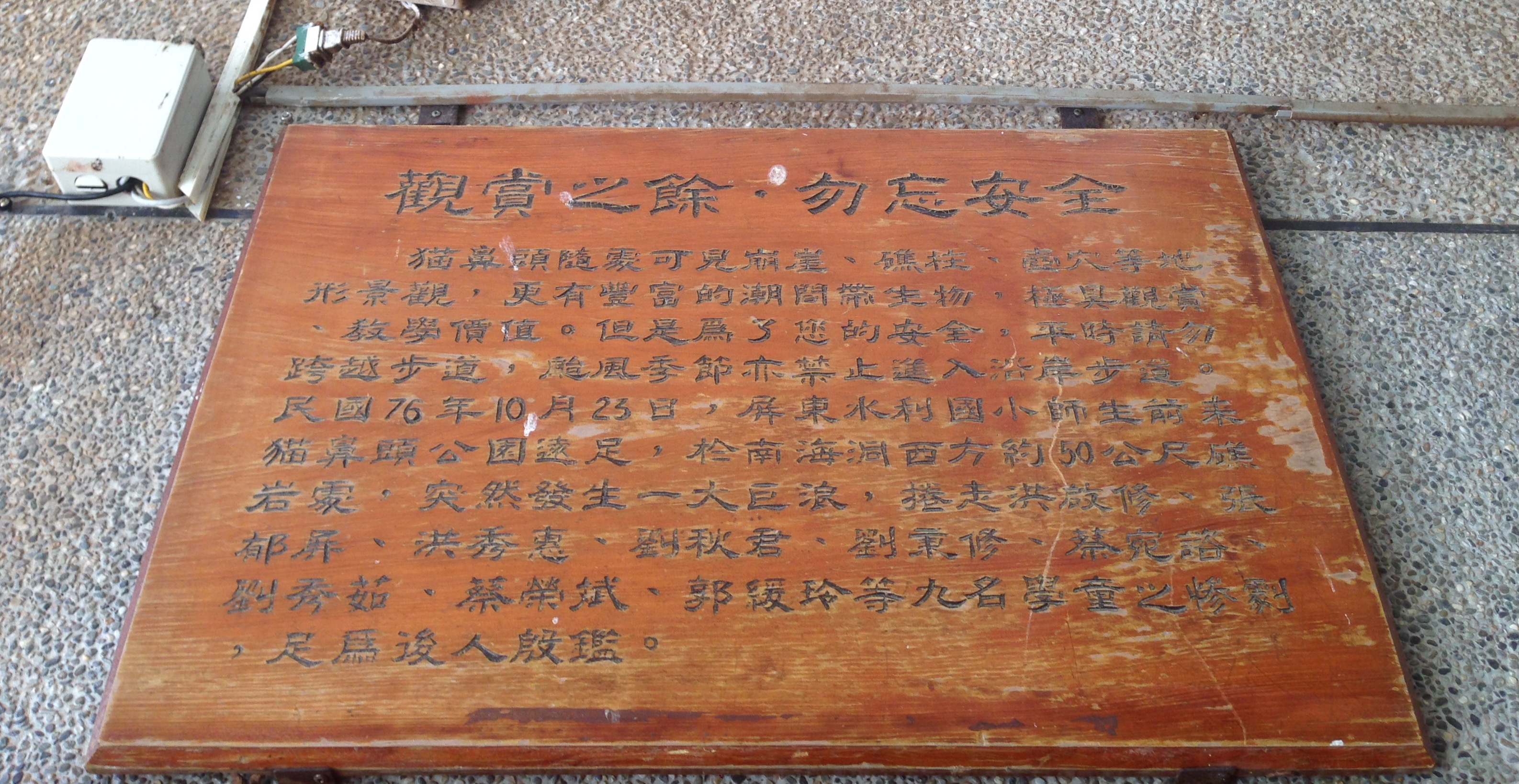 貓鼻頭公園告示牌「觀賞之餘，勿忘安全」，寫著1987年10月23日屏東縣林邊鄉水利國民小學九名學生被瘋狗浪捲走而溺死的事件。